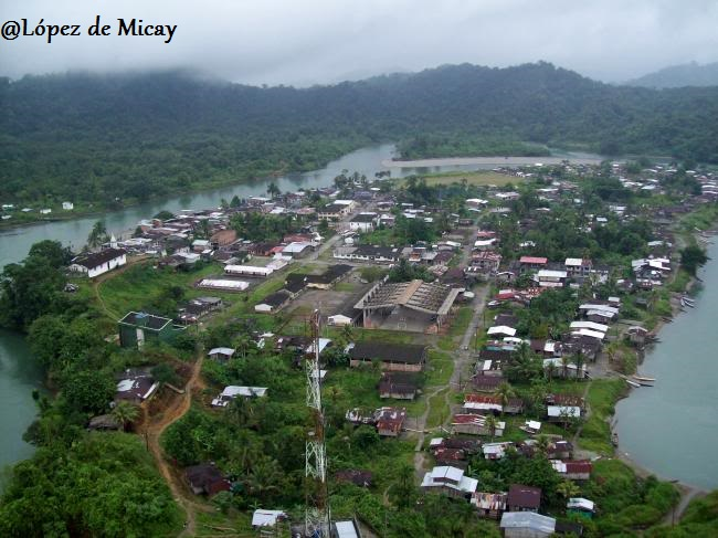 Cabecera Municipal